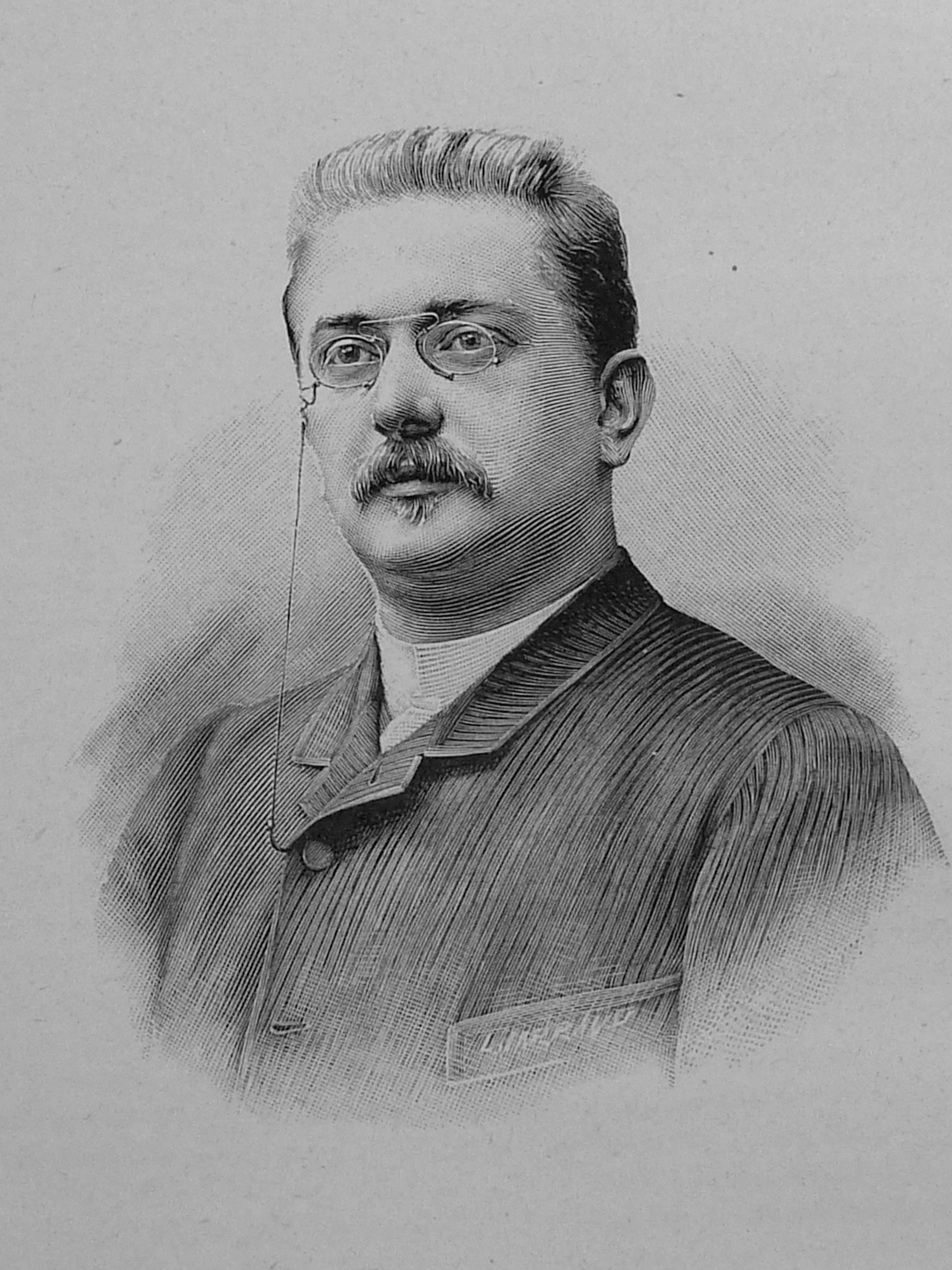 René Koehler, gravure d'après photo dans Figures contemporaines Album Mariani tome XI, 1908. graveur signature illisible .